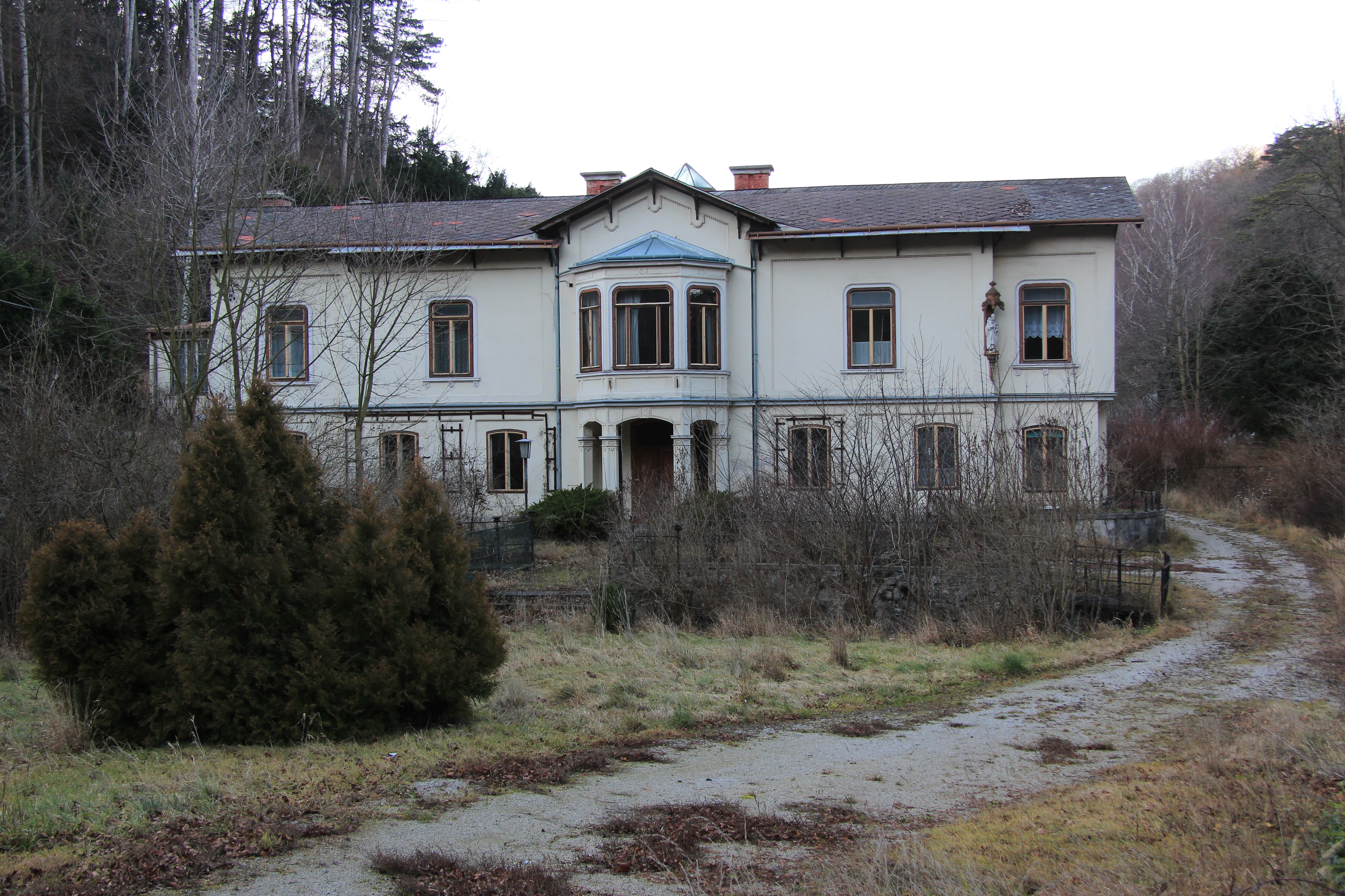 Hauptgebäude der ehemaligen Sauerstiftung in der Hinterbrühl